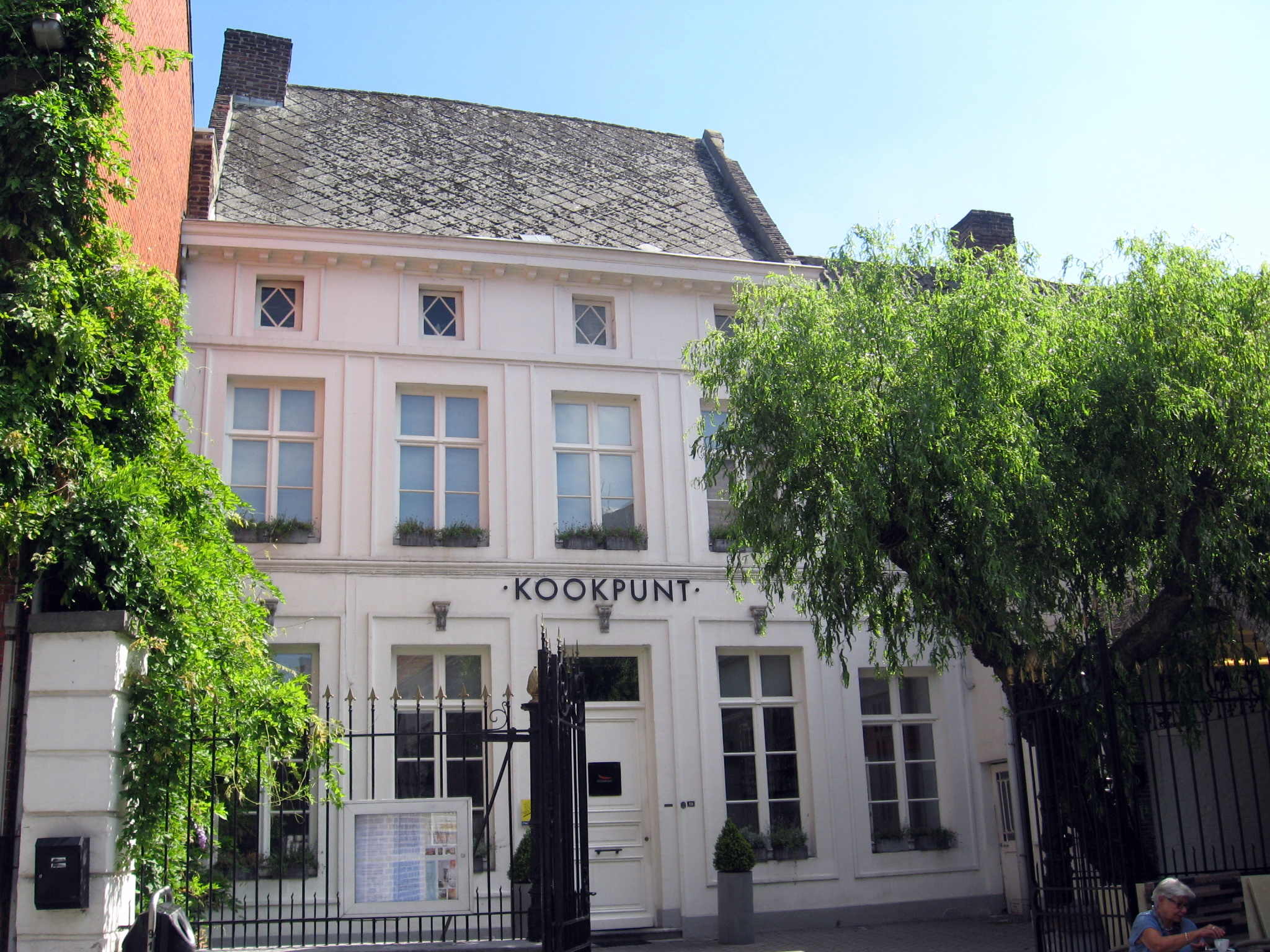 Herenhuis Het Hemelrijk in Hasselt